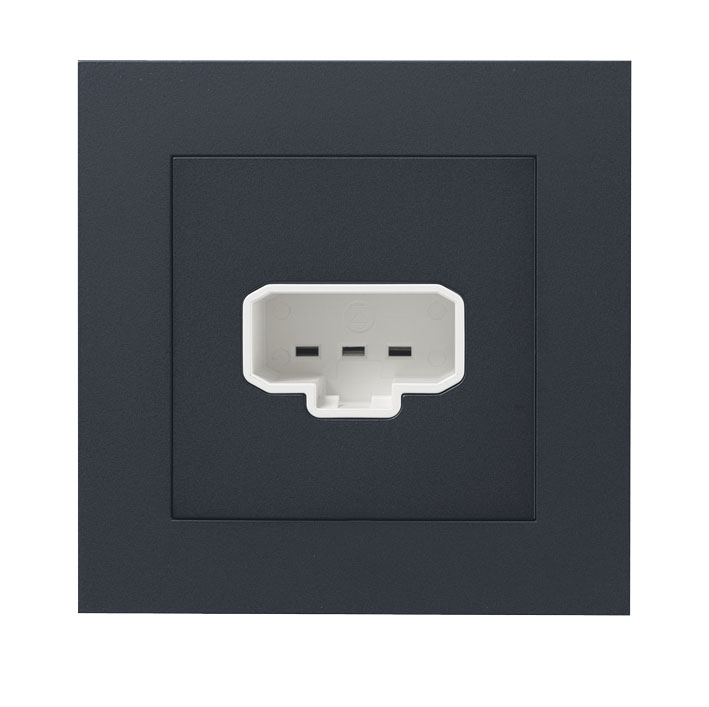 Eksempel på DCL vegguttak (Norsk-ELKO AS)